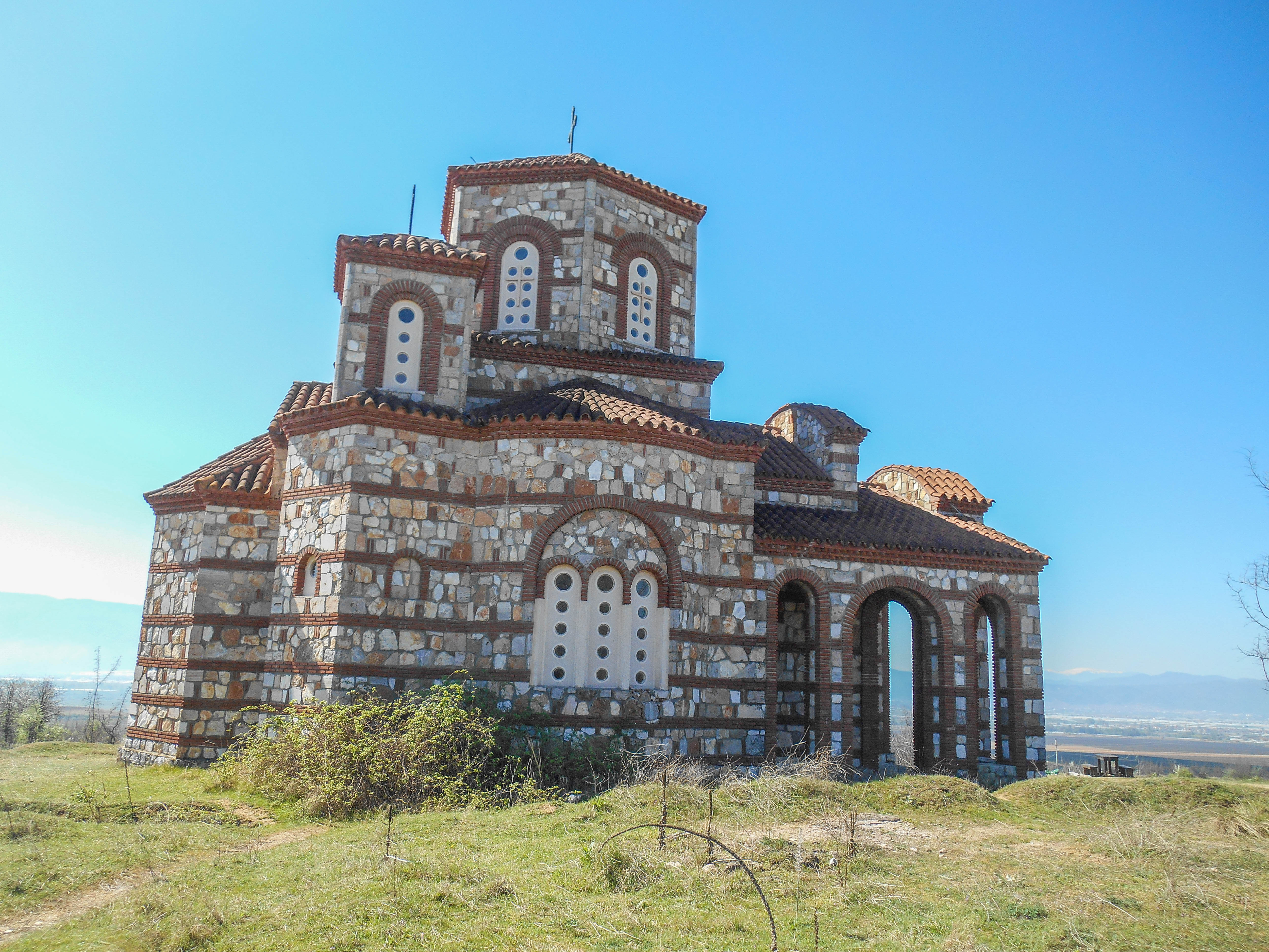 Црква „Св. Климент Охридски“ - Хамзали